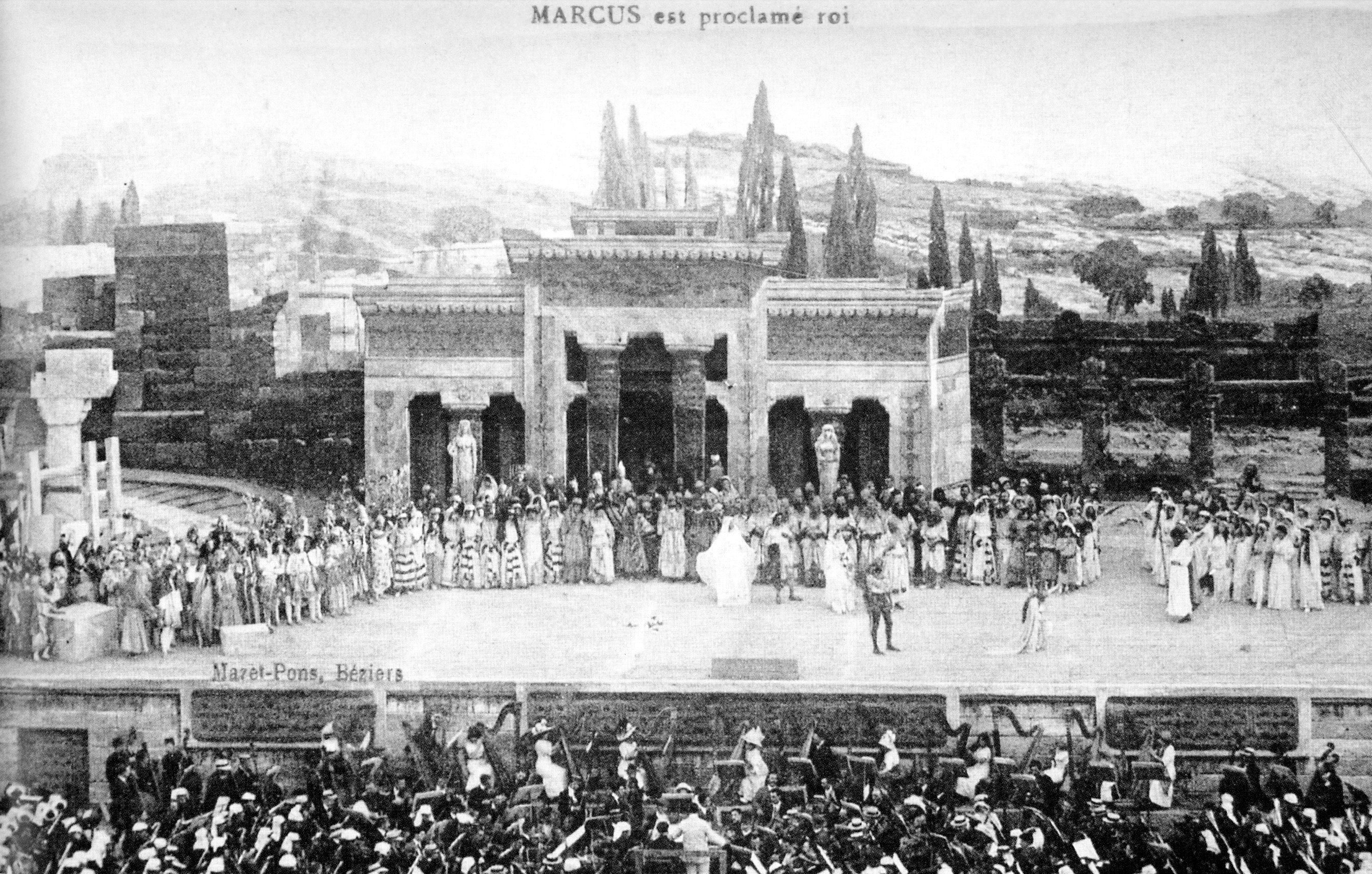 Carte postale éditée en 1911 lors de la représentation des Esclaves d'Aymé Kunc à Béziers